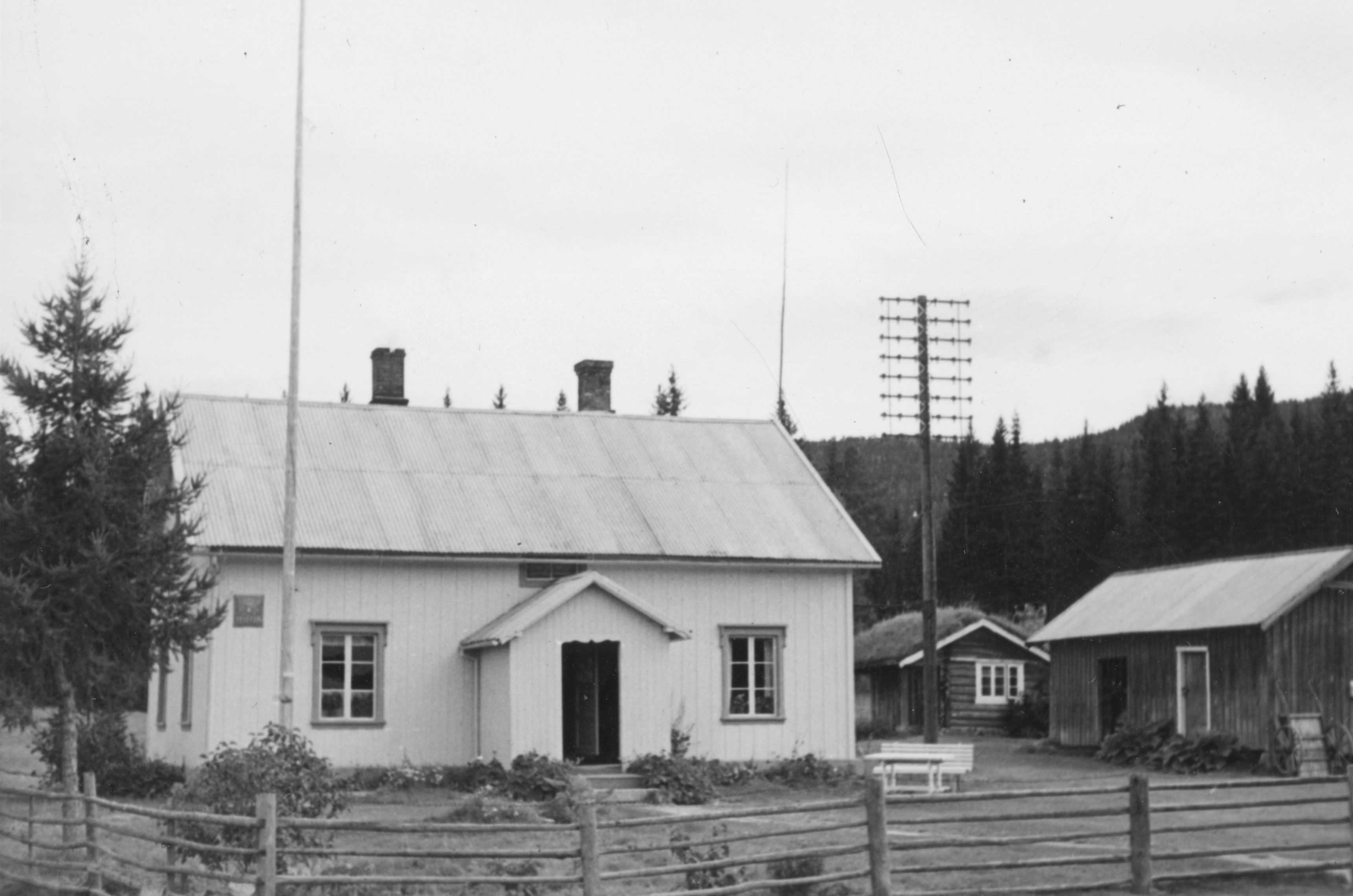 Hanestad rikstelefonstasjon, 1956